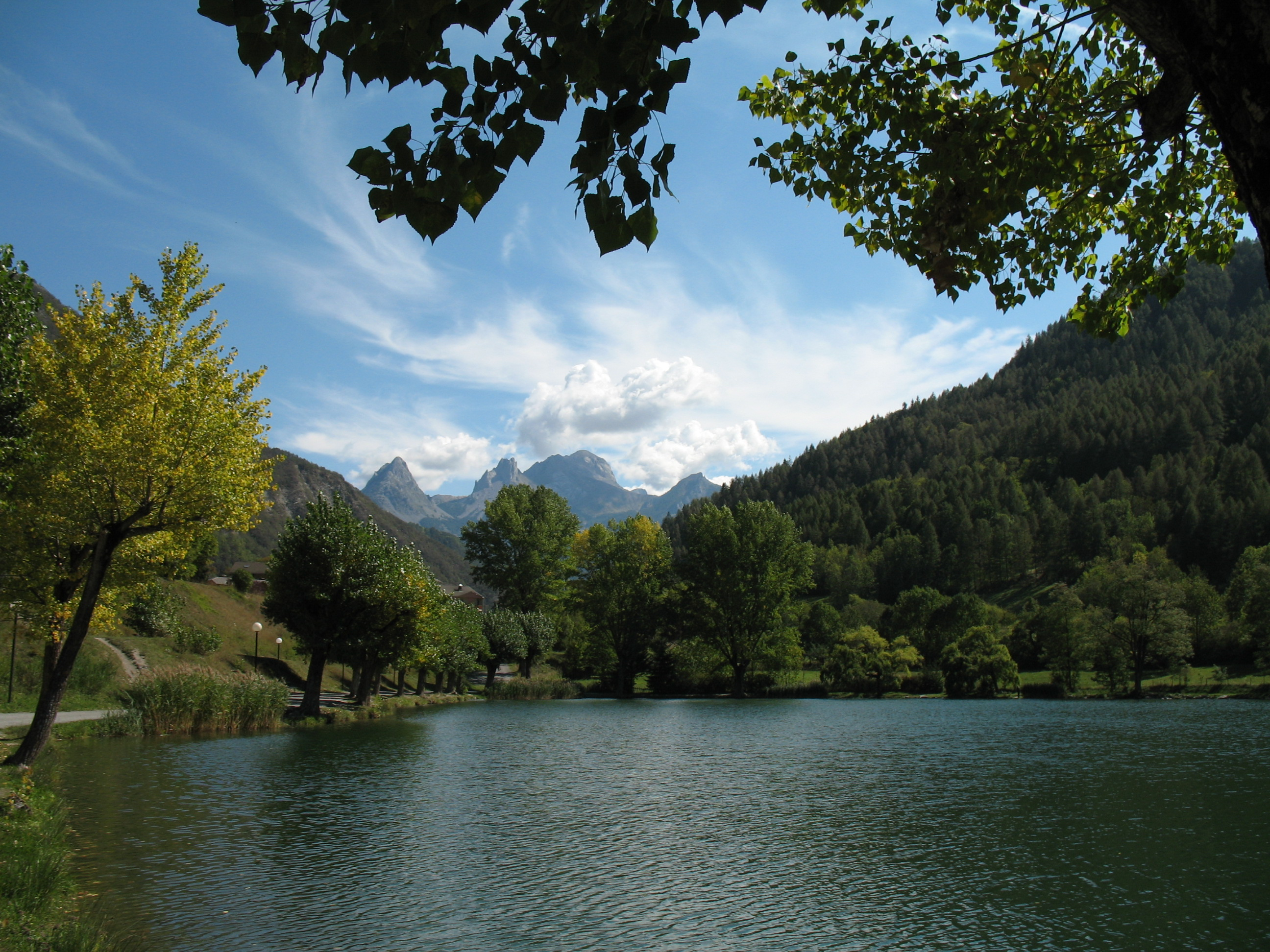 Le Lauzet-Ubaye, département des Alpes-de-Haute-Provence, France